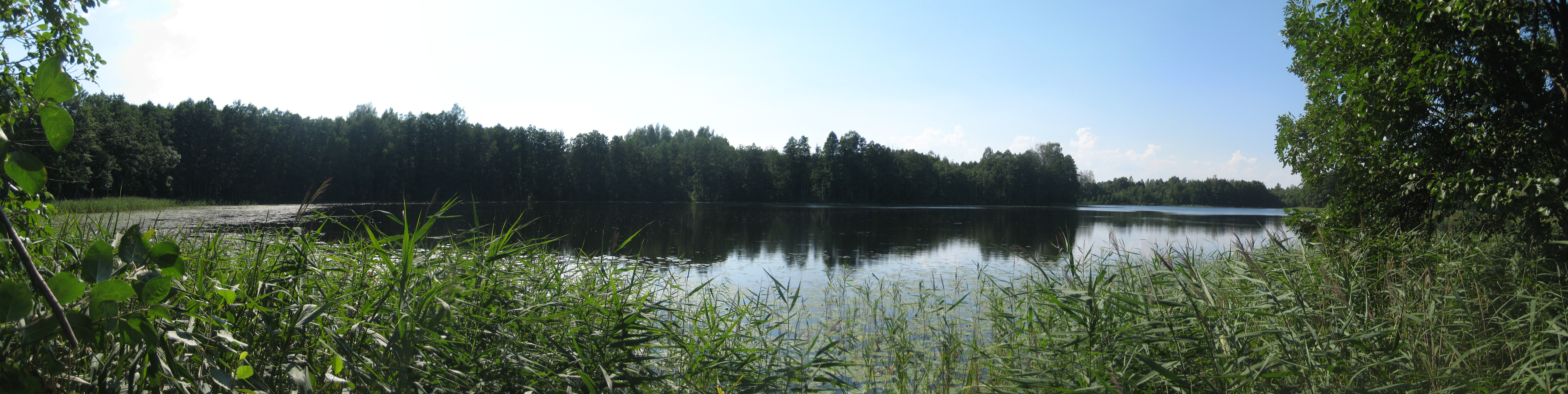 Suvieko sen., Lithuania